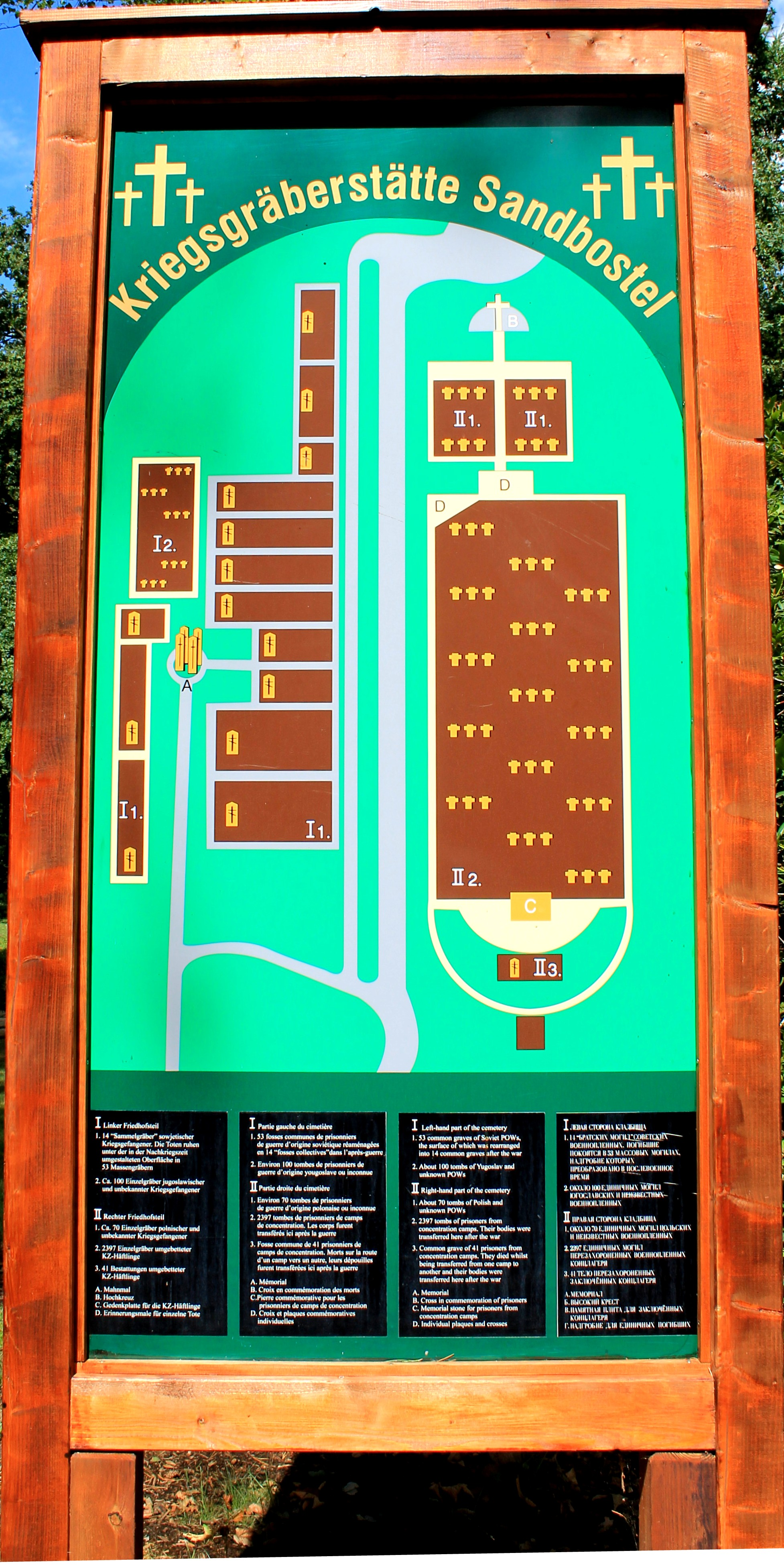 Info-Tafel zur Friedhofsstrukrur